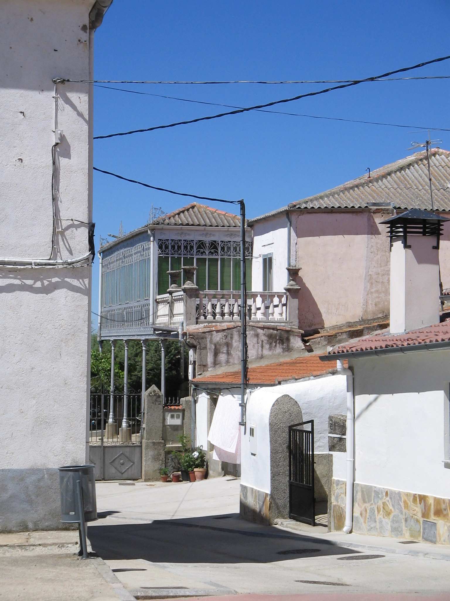 Vista desde la plaza de la Iglesia, al fondo una casa señorial con las galerías típicas